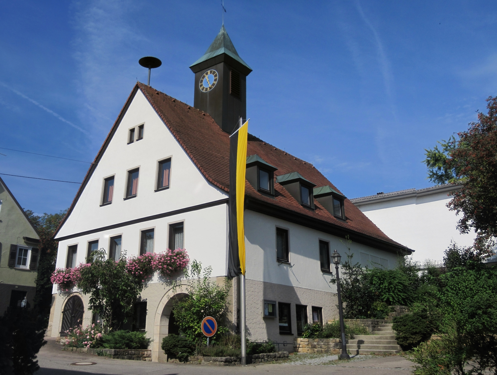 Das Rathaus im Nürtinger Stadtteil Hardt.